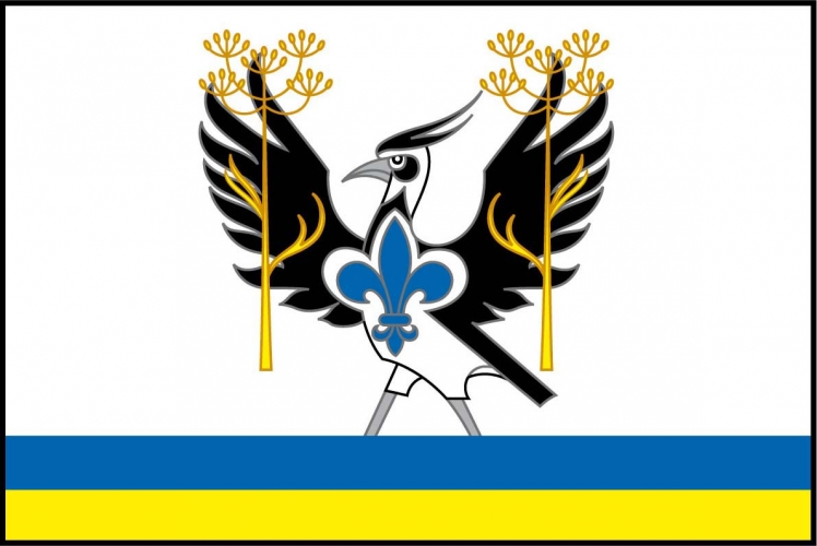 vlajka,Čejkovice , okres Znojmo